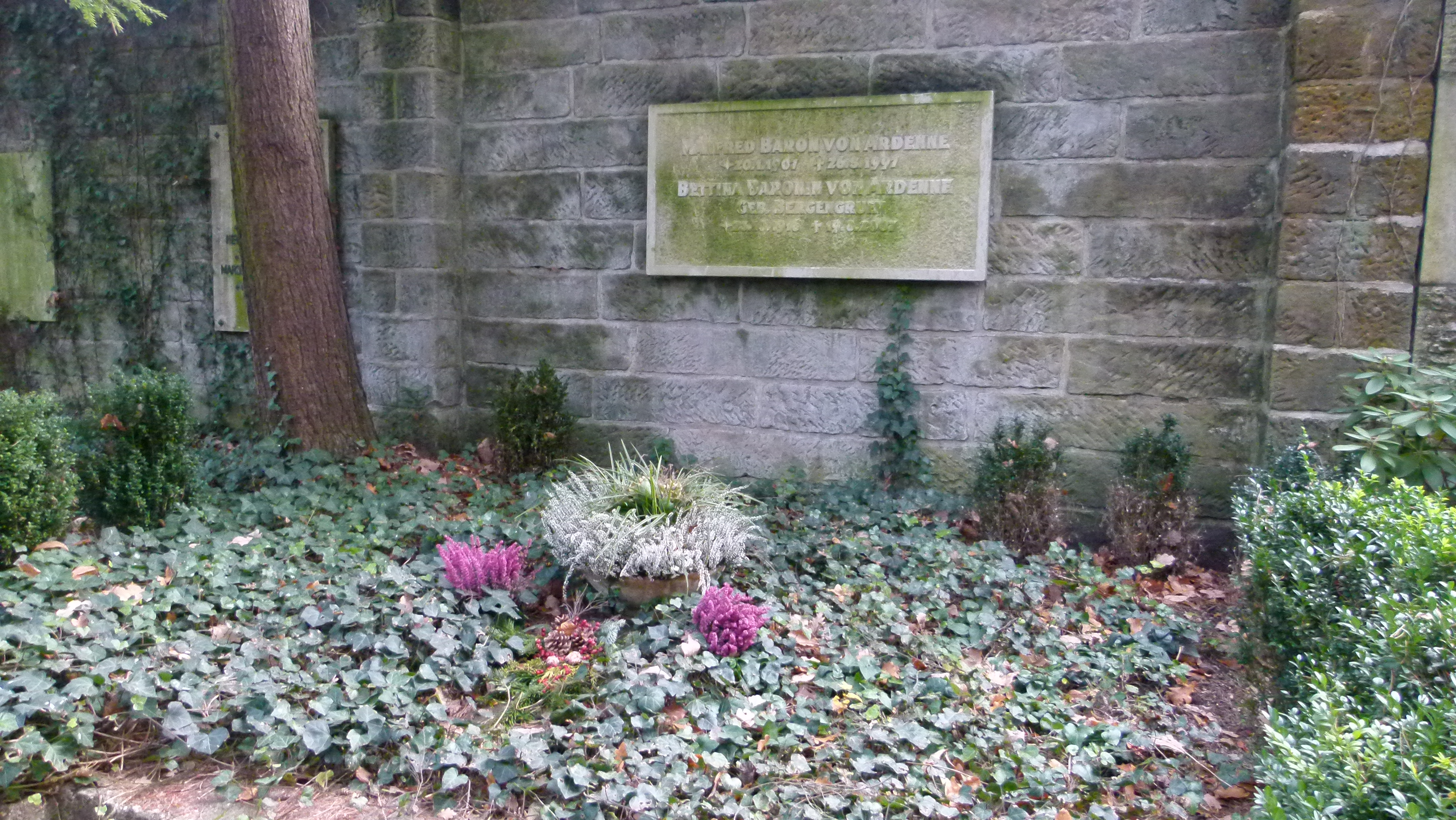 Grab von Manfred von Ardenne auf dem Waldfriedhof Weißer Hirsch in Dresden